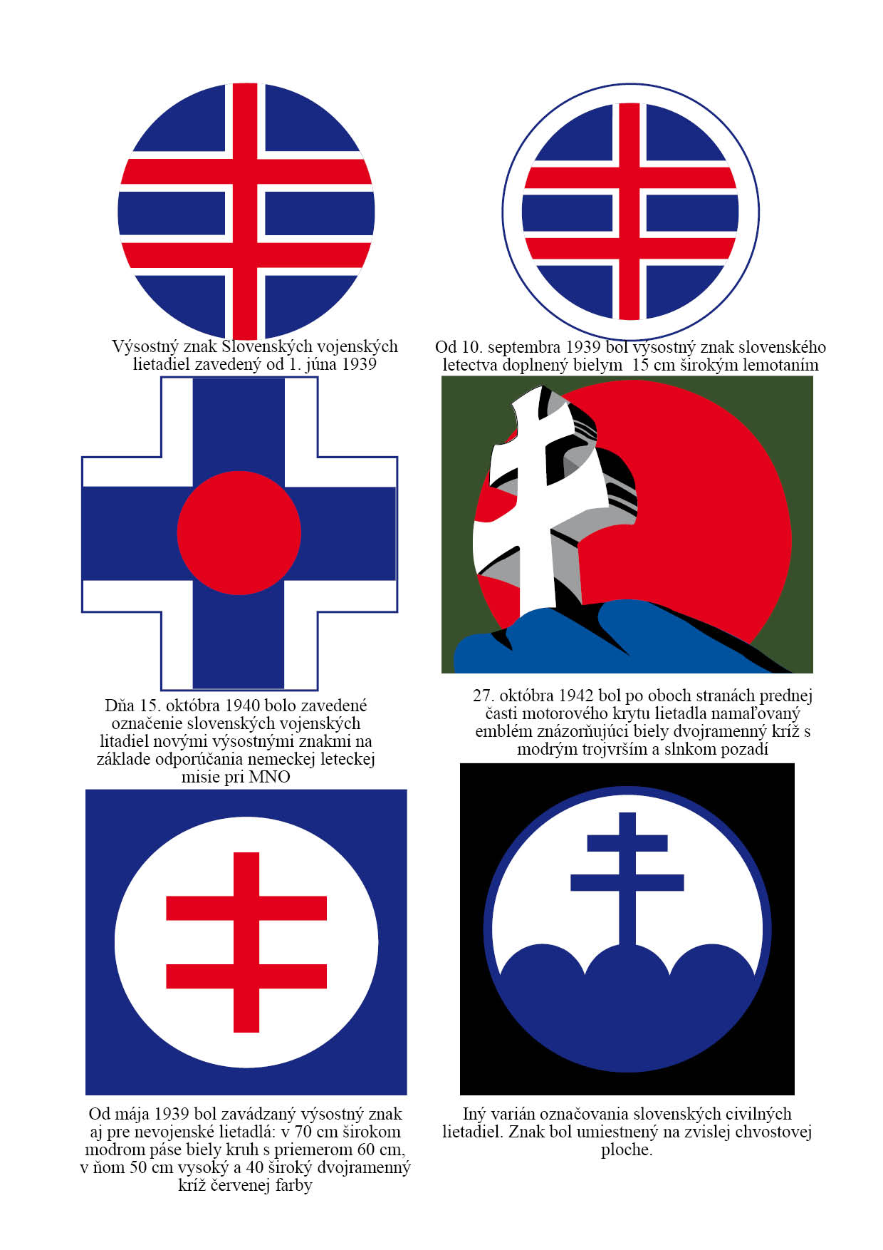 Označenie vojenských lietadiel vojnovej Slovenskej republiky v rokoch 1939 - 1945